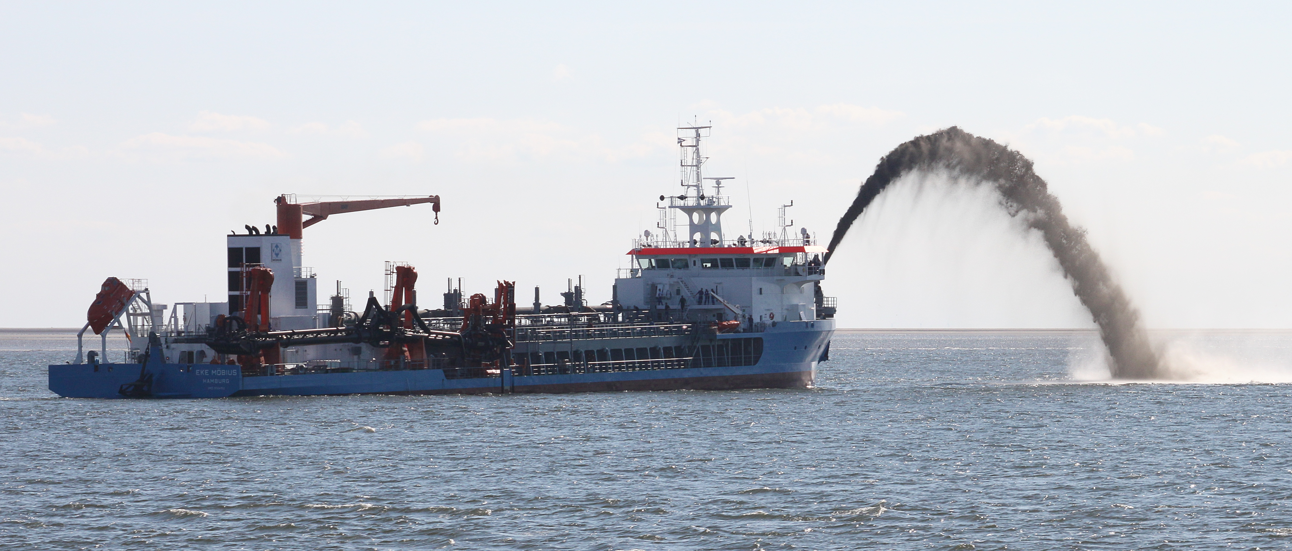 Eke Möbius; Hopperbagger; Position: (der Fotograf - mit de Katamaran) von Helgoland kommend - kurz vor der Einfahrt in Cuxhaven